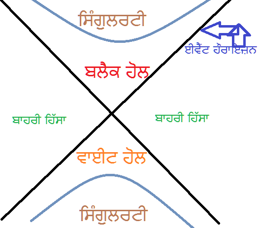 ਪੰਜਾਬੀ: ਵੱਧ ਤੋਂ ਵੱਧ ਫੈਲਾਈ ਗਈ ਬਲੈਕ ਹੋਲ ਸਪੇਸਟਾਈਮ ਦੀ ਬਣਤਰ ਦਾ ਇੱਕ ਚਿੱਤਰ. ਲੇਟਵੀੰ ਦਿਸ਼ਾ ਸਪੇਸ ਹੈ ਅਤੇ ਖੜਵੀਂ ਦਿਸ਼ਾ ਵਕਤ ਹੈ